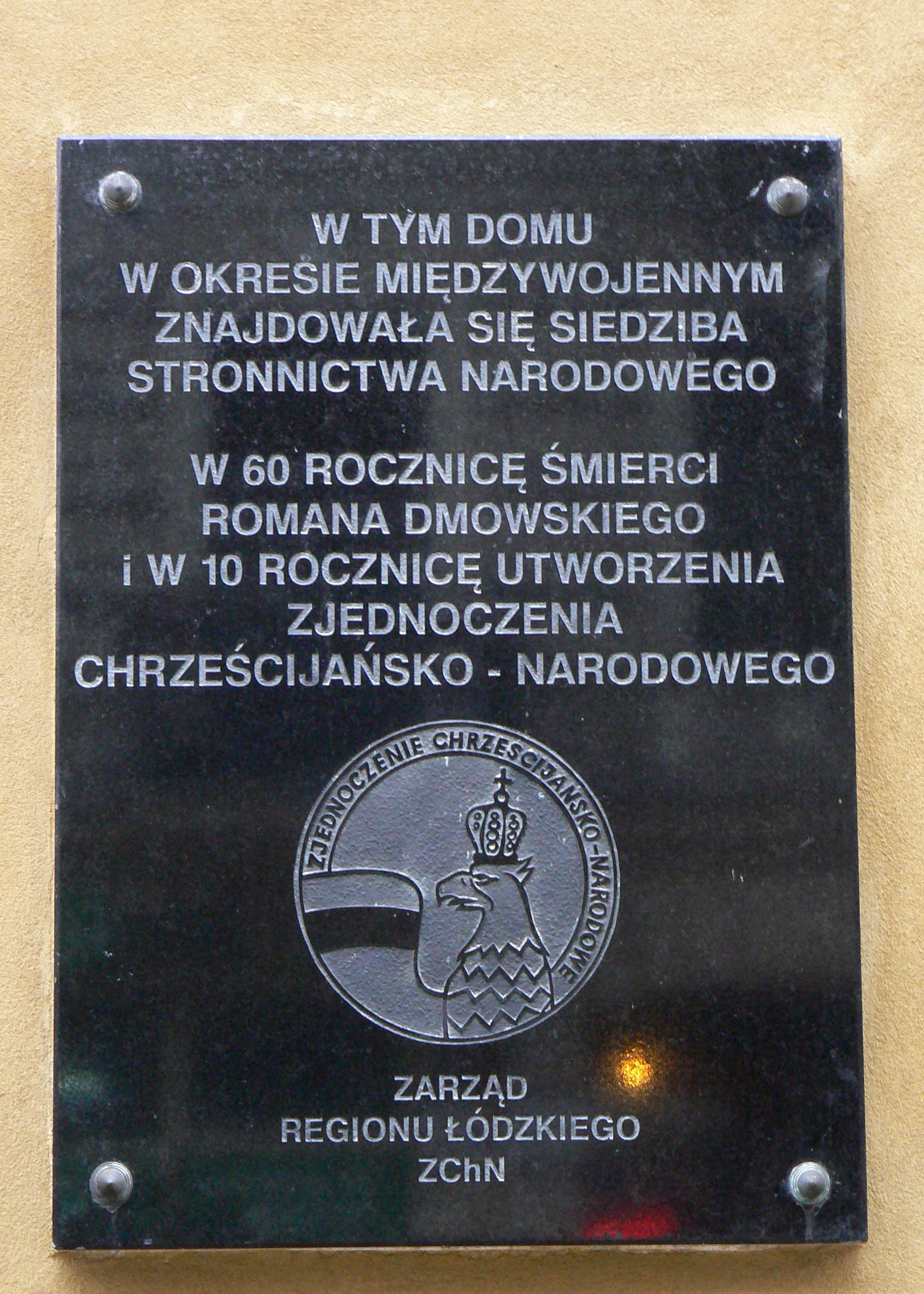 Tablica na budynku przy Piotrkowskiej 86 w Łodzi (Kamienica pod Gutenbergiem).